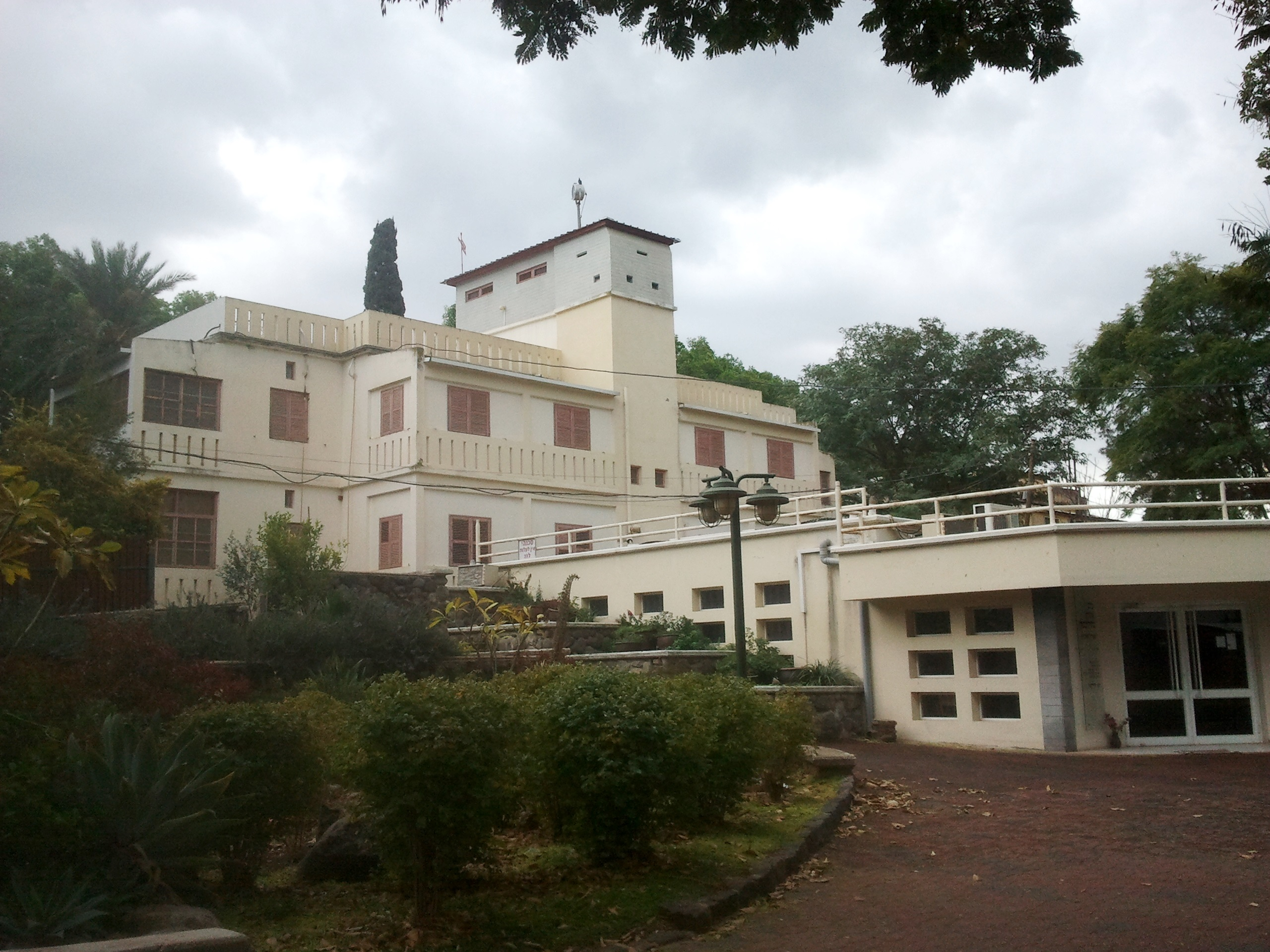 מוזיאון כנרת. הבית נבנה בשנת 1929 ונקרא הבית האמצעי בראש הגבעה לאחר שיפוץ נפתח בשנת 1989 מחדש ומשמש כמוזיאון קבוצת כנרת והארכיון שלה הבית מאחור תוכנו על ידי האדריכל ריכרד קאופמן, בחזיתו בית אהרון שידלובסקי המשמש כספרייה וארכיון